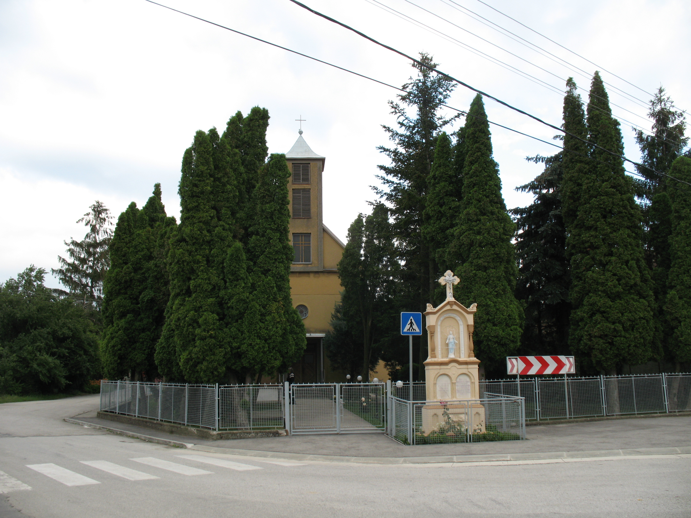 Hegysúr